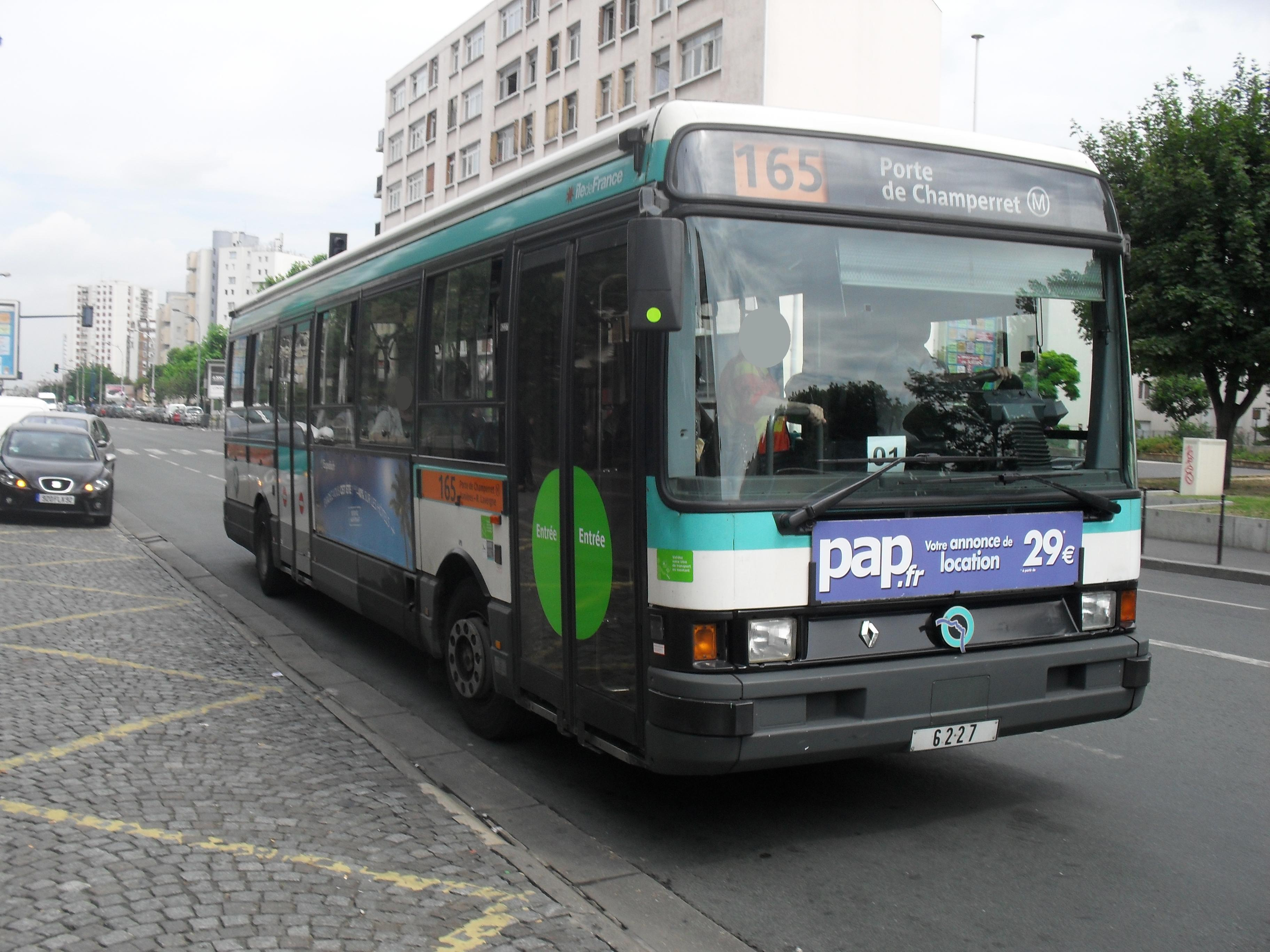 Ligne RATP 165